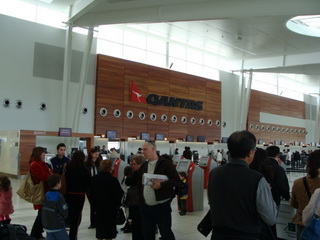 阿德雷得機場 - Adelaide Airport